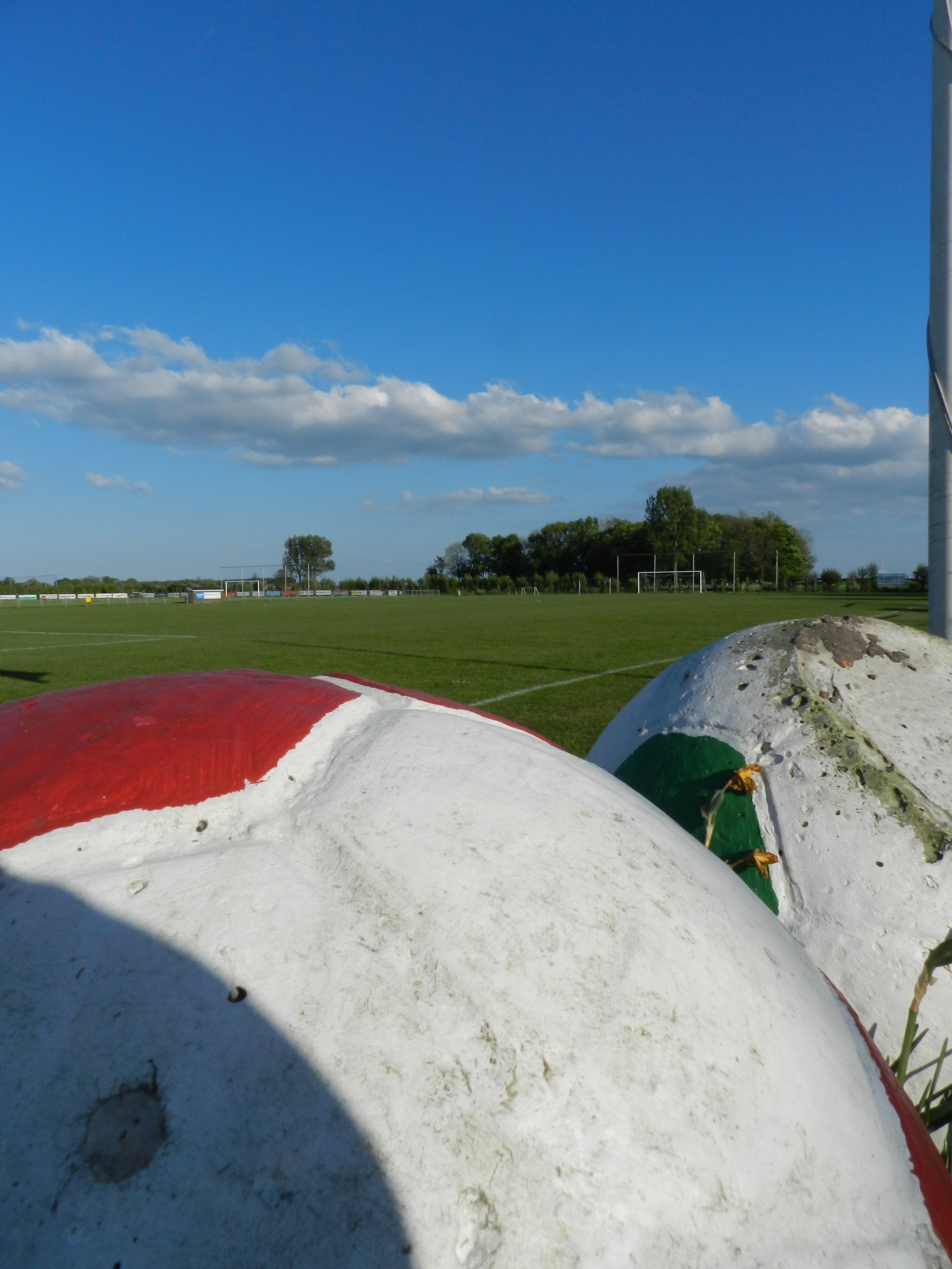 Veld 1 van S.V. MMO Hoogmade, Nederland.